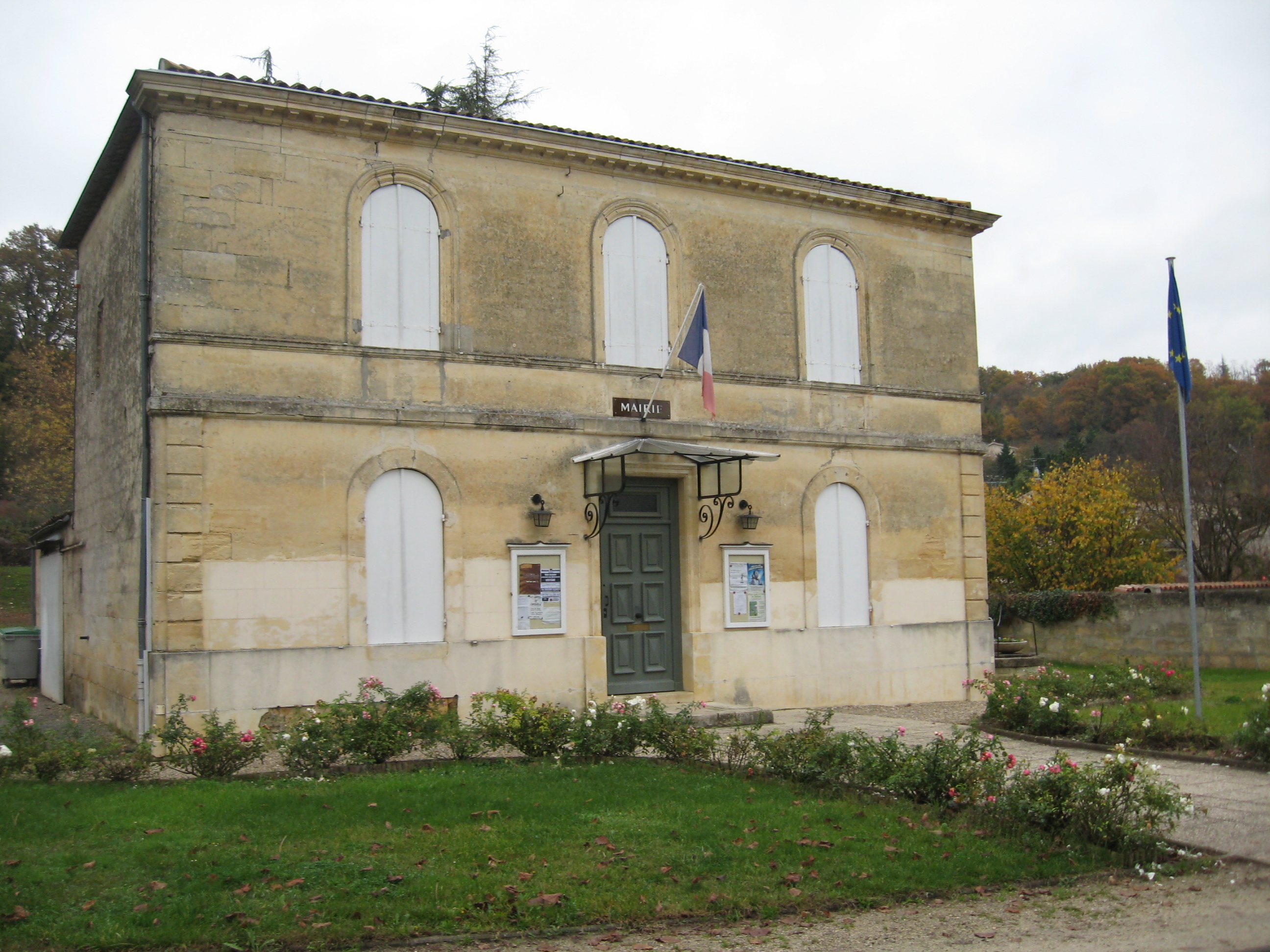 Mairie de Lestiac-sur-Garonne (Gironde)